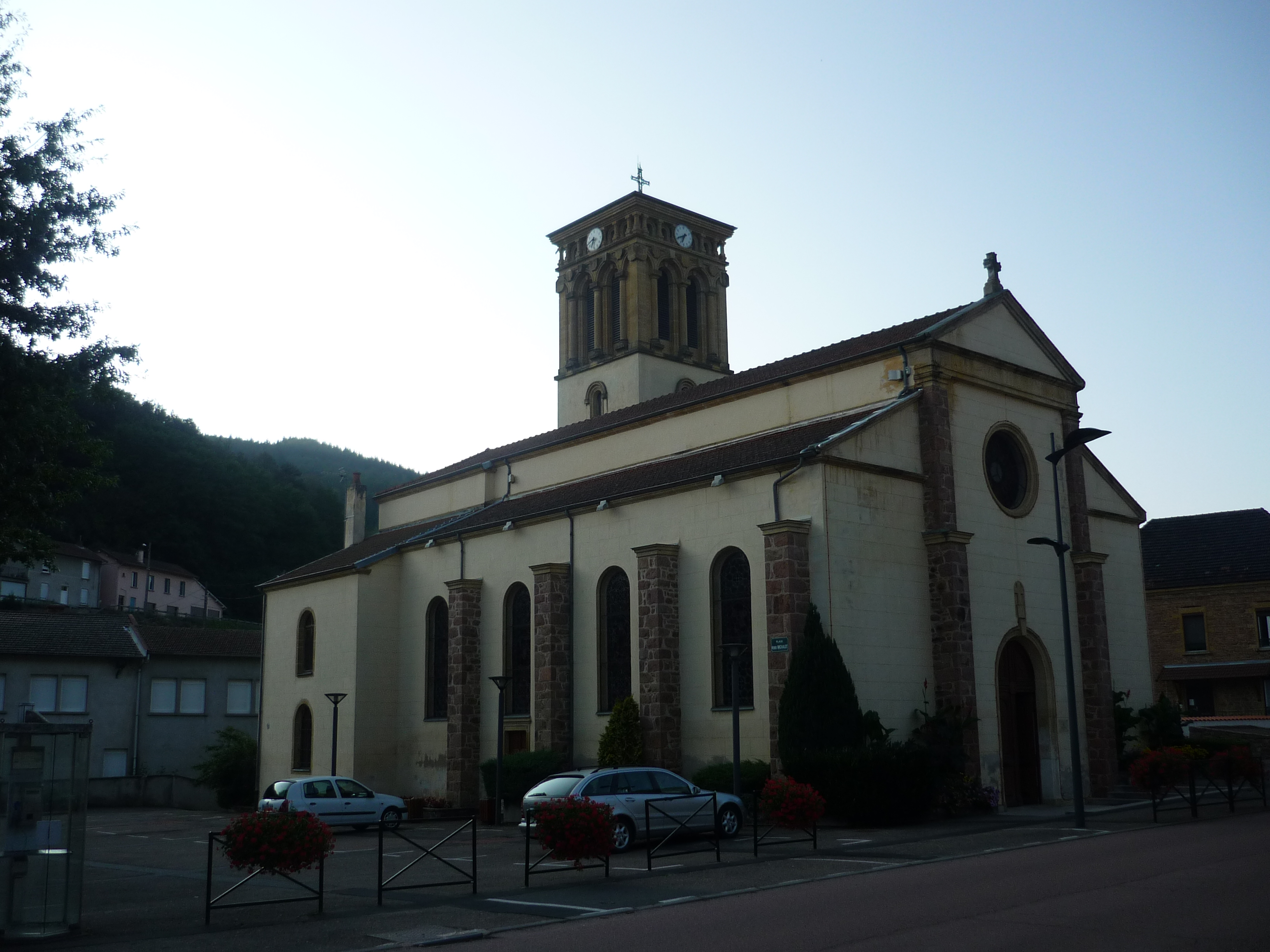 Église de Pont-Trambouze, dans le Rhône